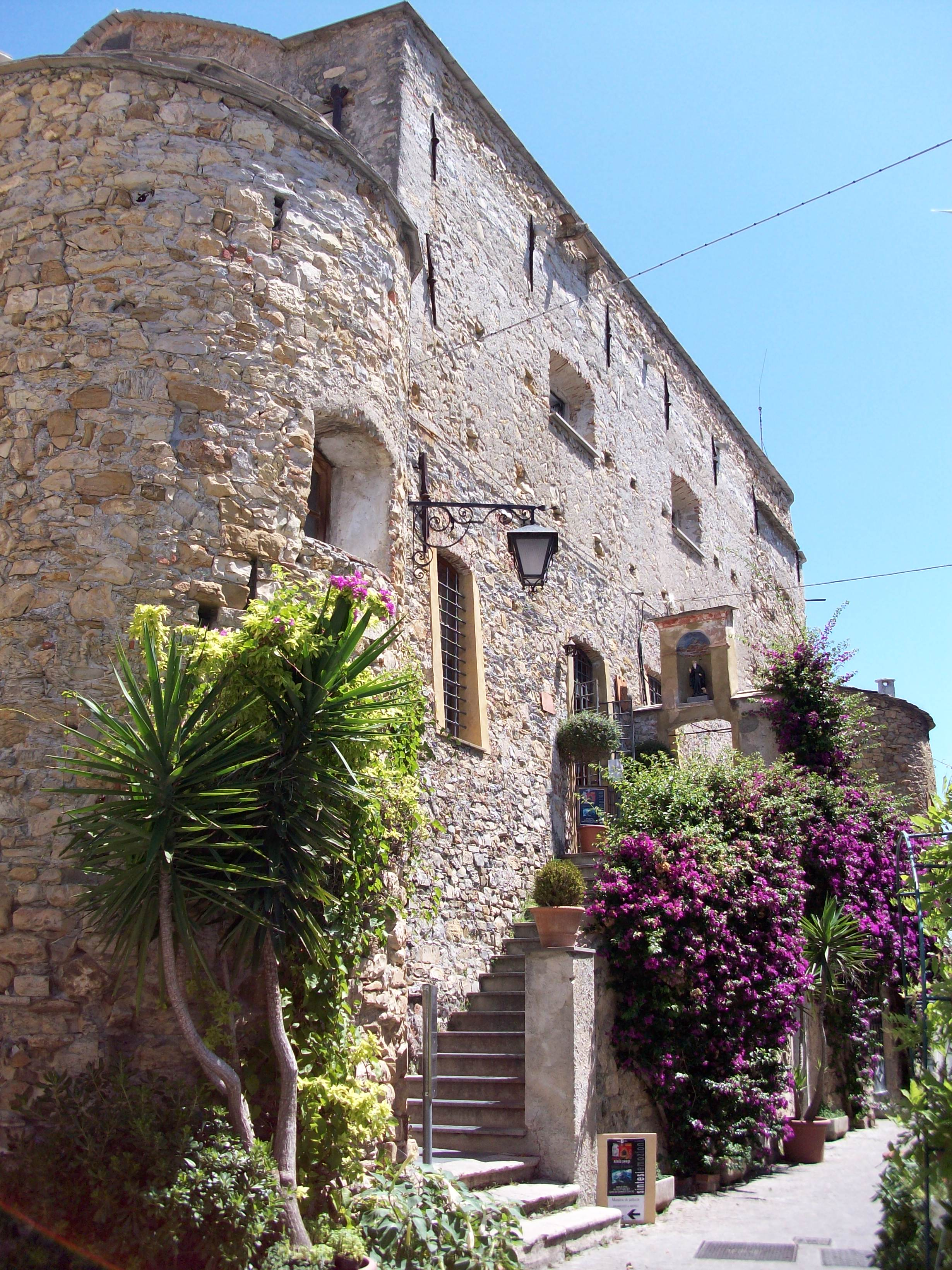 Burg und Stadtmuseum von Cervo; von links ist der Eingang zum Ort von der Spornseite des Stadthügels aus; rechts des Bildes der Burgvorplatz mit Zugang zu den Gassen der Altstadt